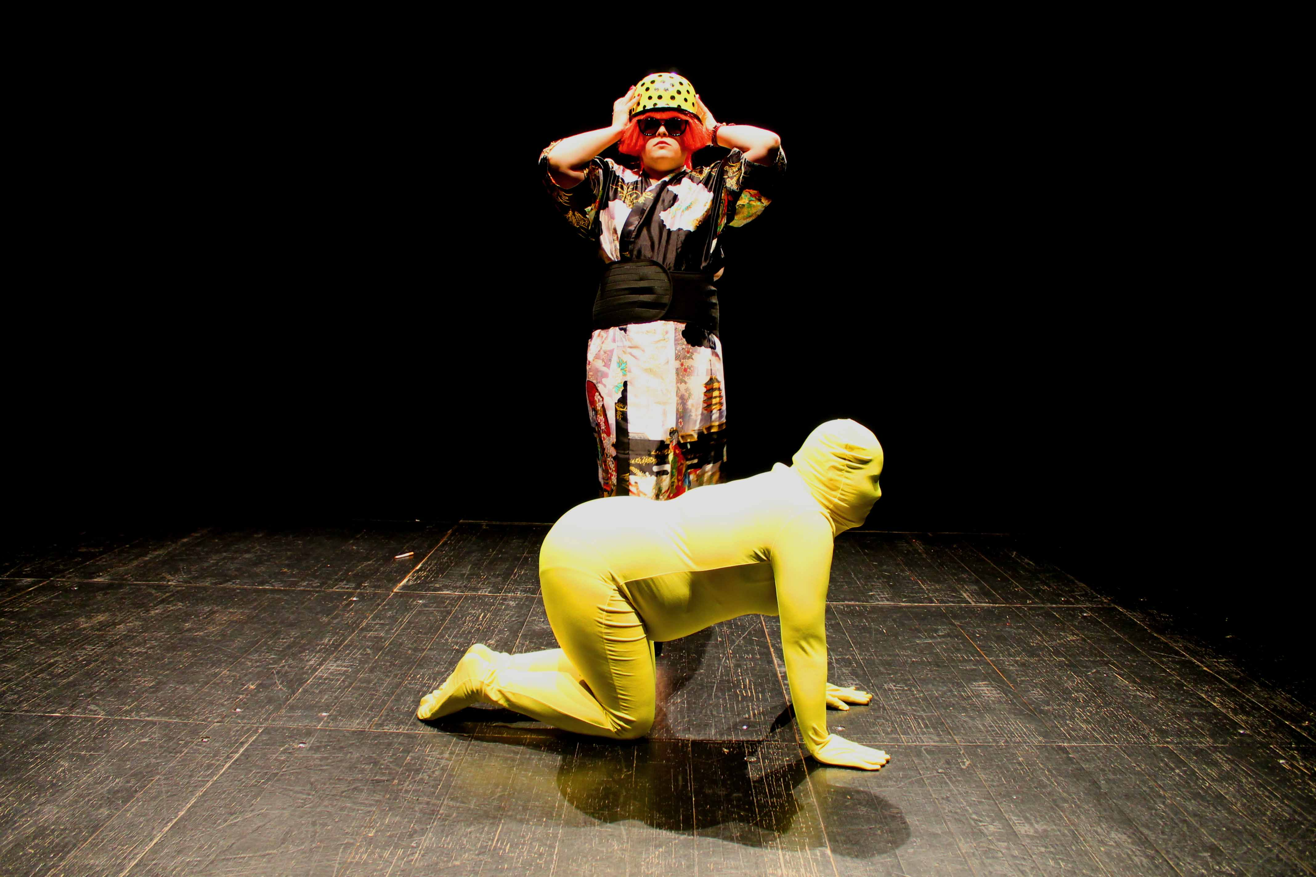 Fotografia do espectáculo Kusama e Warhol: o maior roubo da pop, das produções D. Mona.